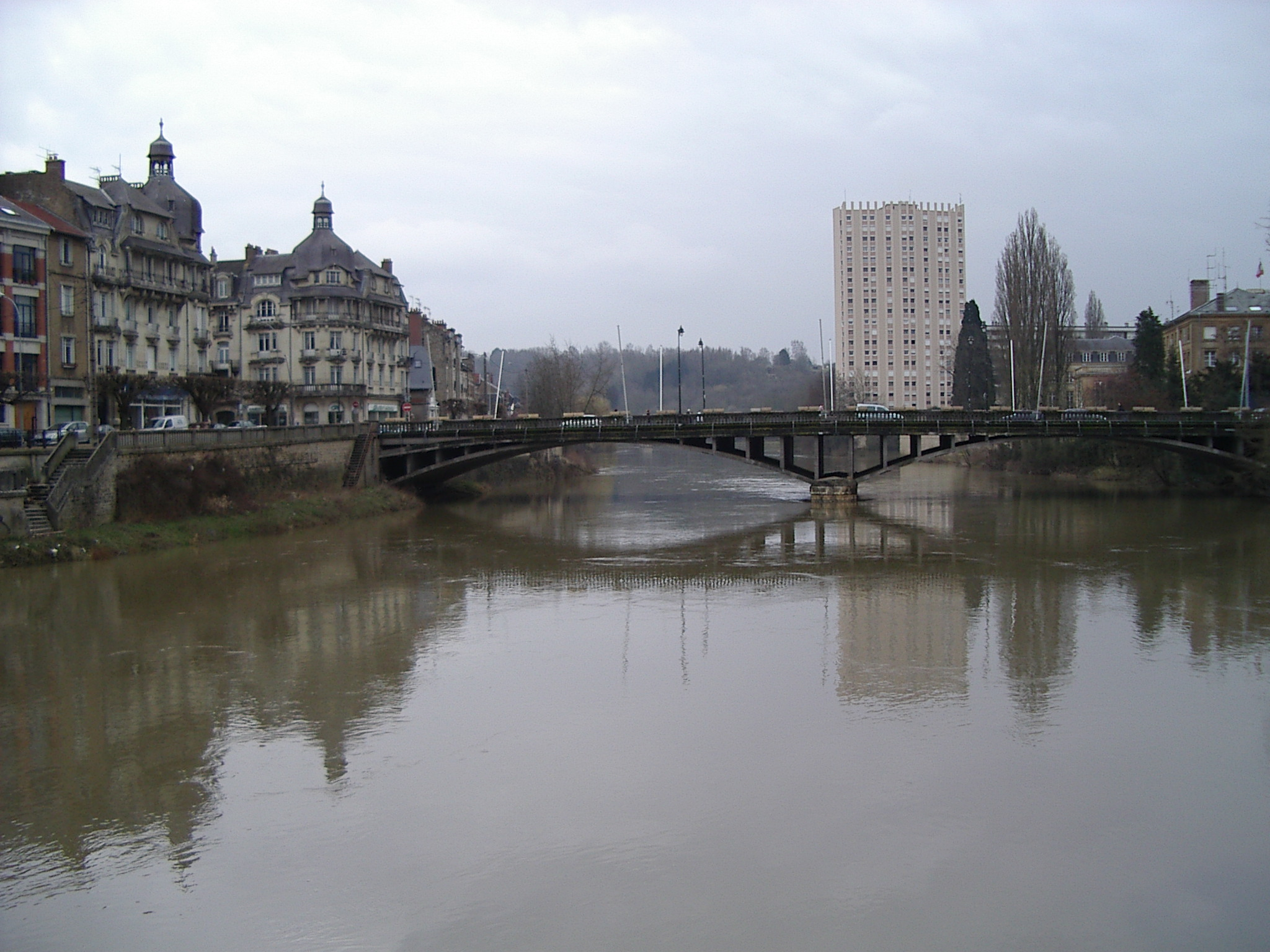 Le Fleuve Meuse à Mézières Charleville-Mézières et sur la gauche les bâtiments de la place de l'Hôtel de ville.